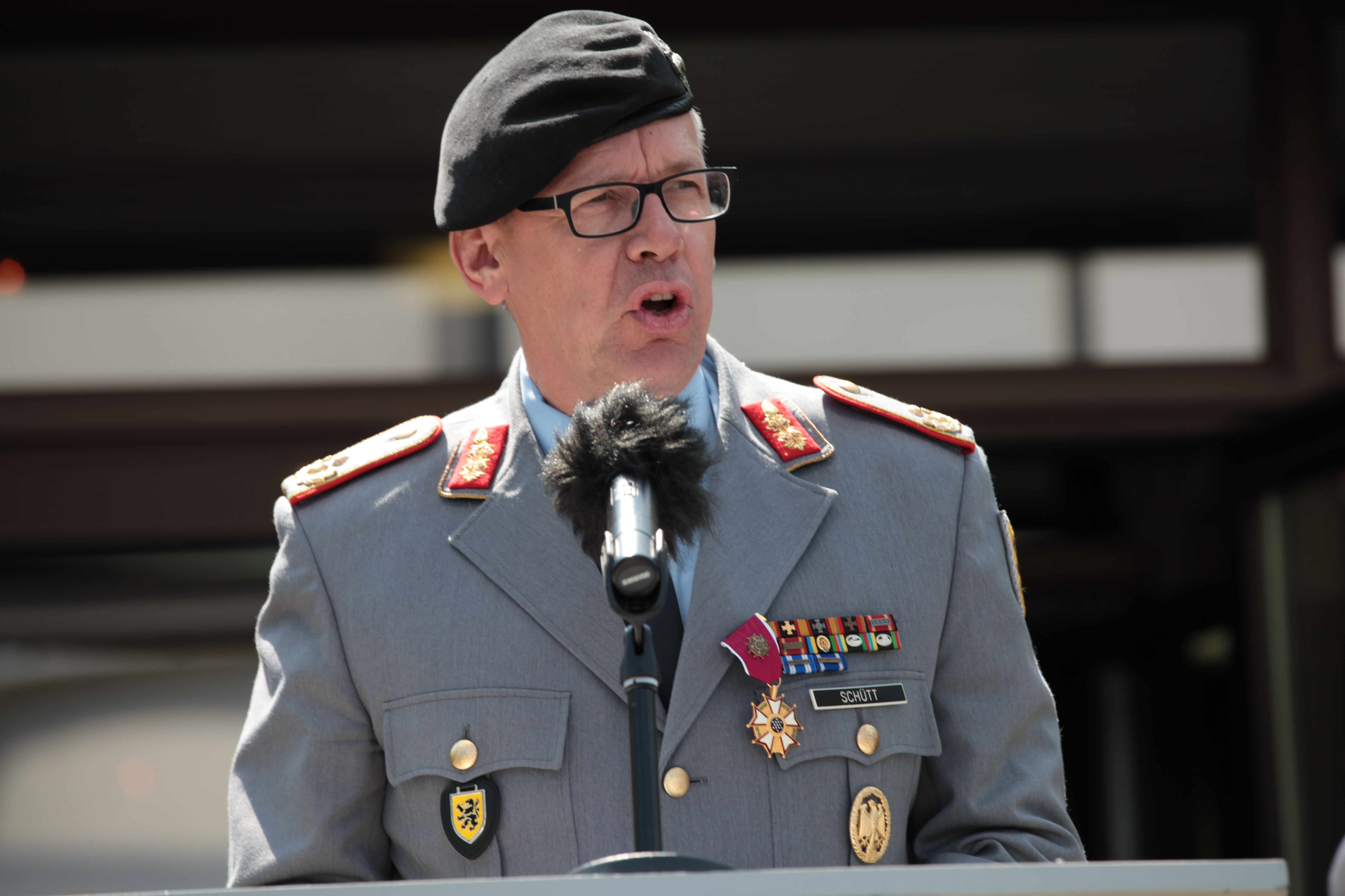 Generalmajor Bernd Schütt, Armed Forces Day 2016 in Berlin